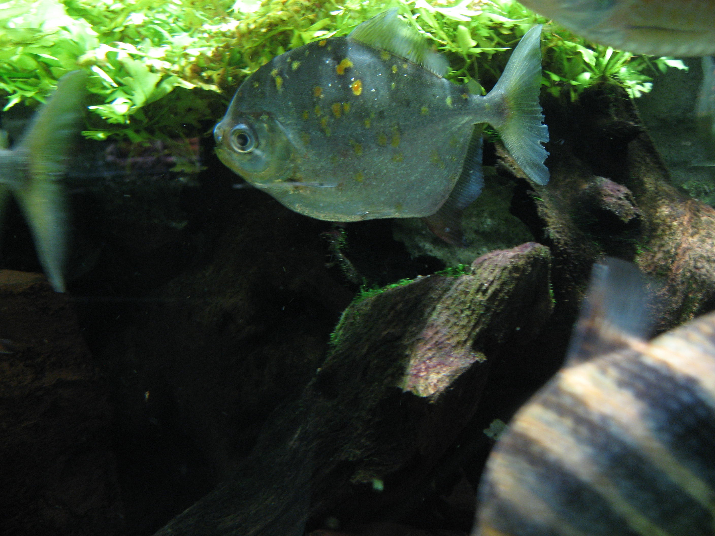 Myloplus rubripinnis in Muséum-aquarium de Nancy Map: 48° 41' 41" N 6° 11' 18" E